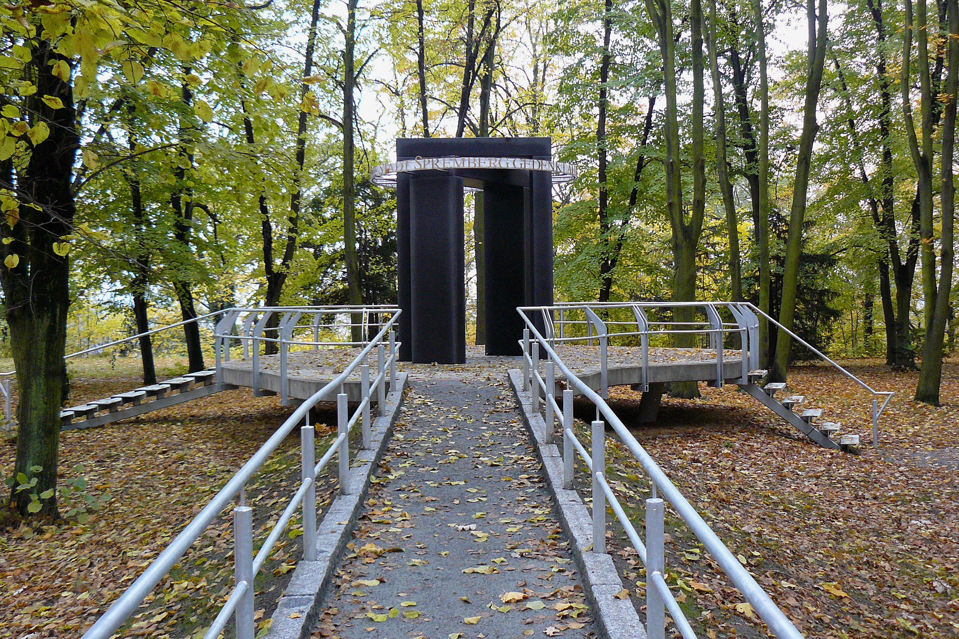 Denkmalanlage "Hürden überwinden" auf dem Georgenberg der Stadt Spremberg/ Brandenburg/ Deutschland DIE STADT SPREMBERG GEDENKT ALLER OPFER VON KRIEG UND GEWALTHERRSCHAFT